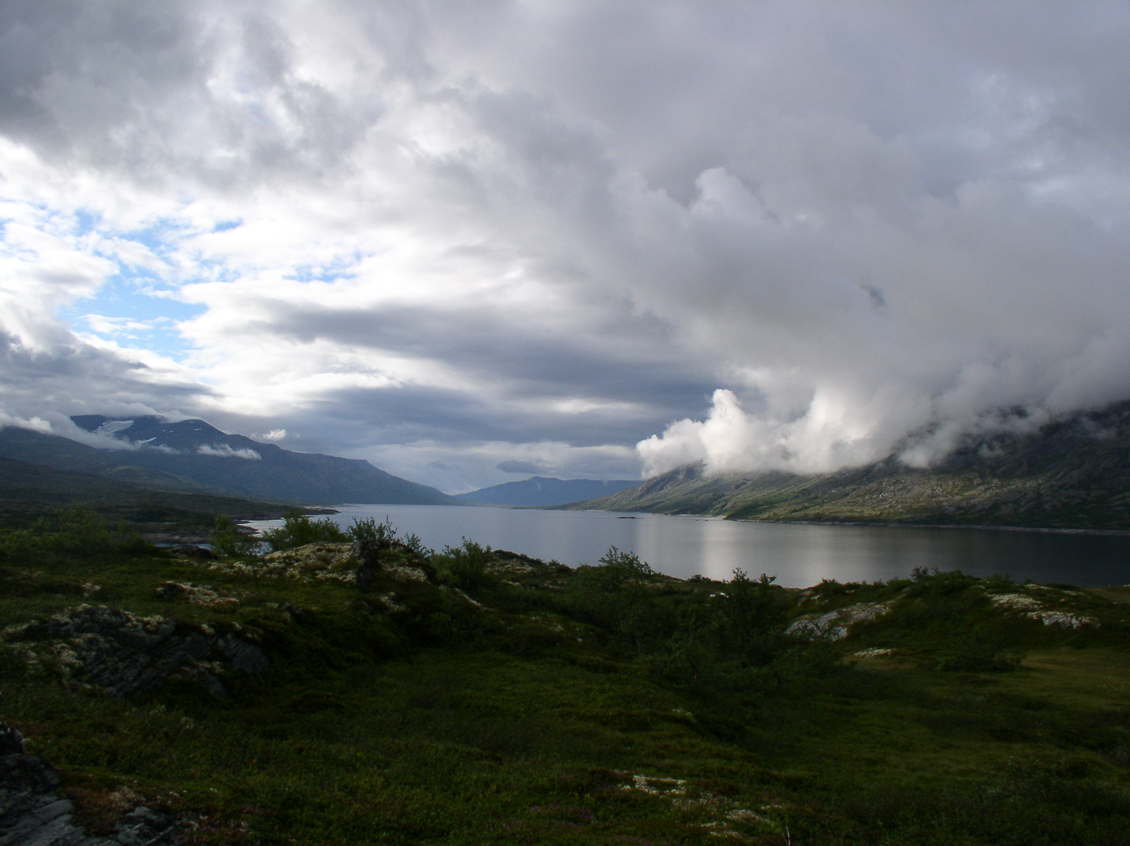 Aursjøen